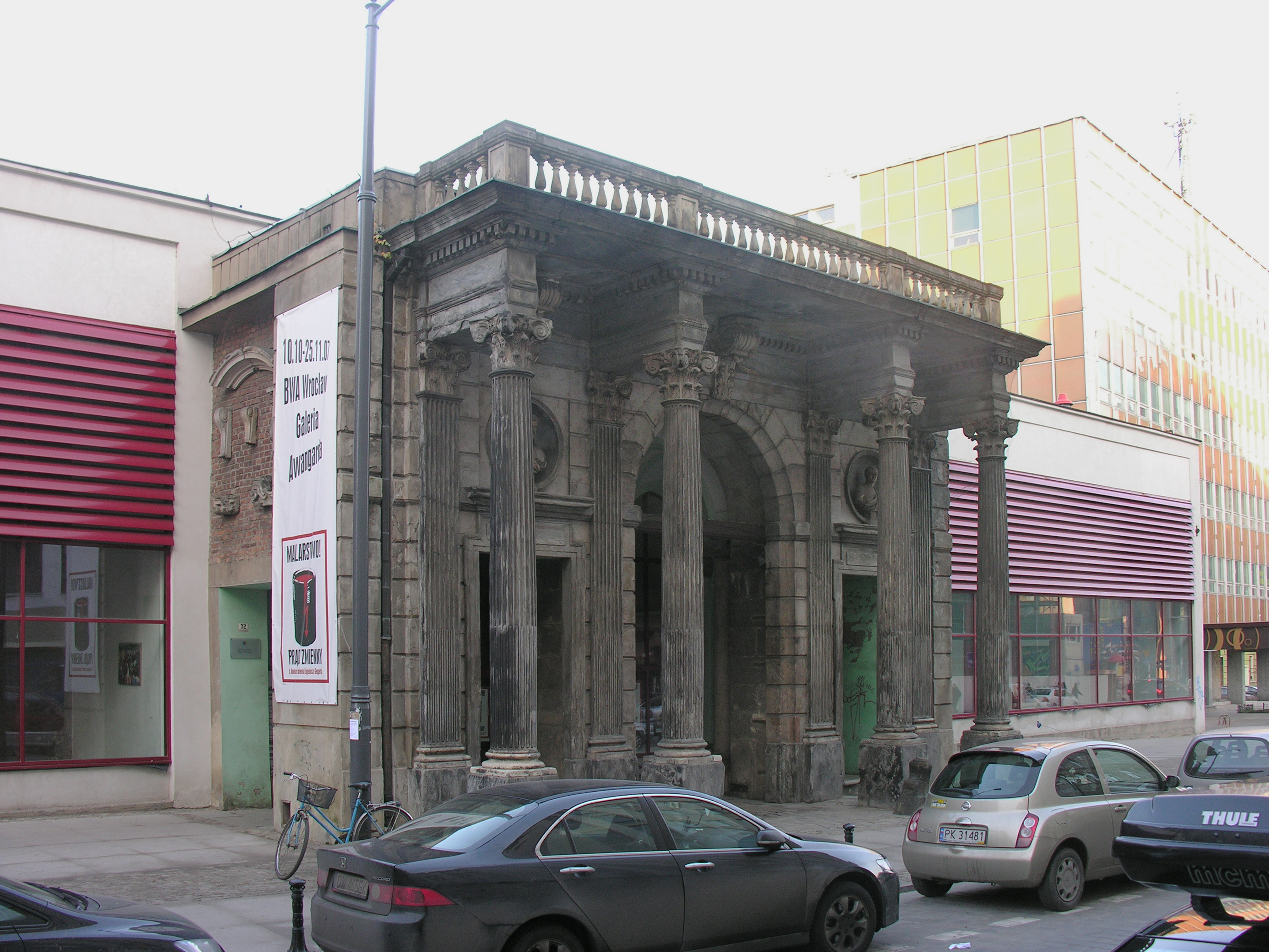 Pałac Hatzfeldów we Wrocławiu, ul. Wita Stwosza 32